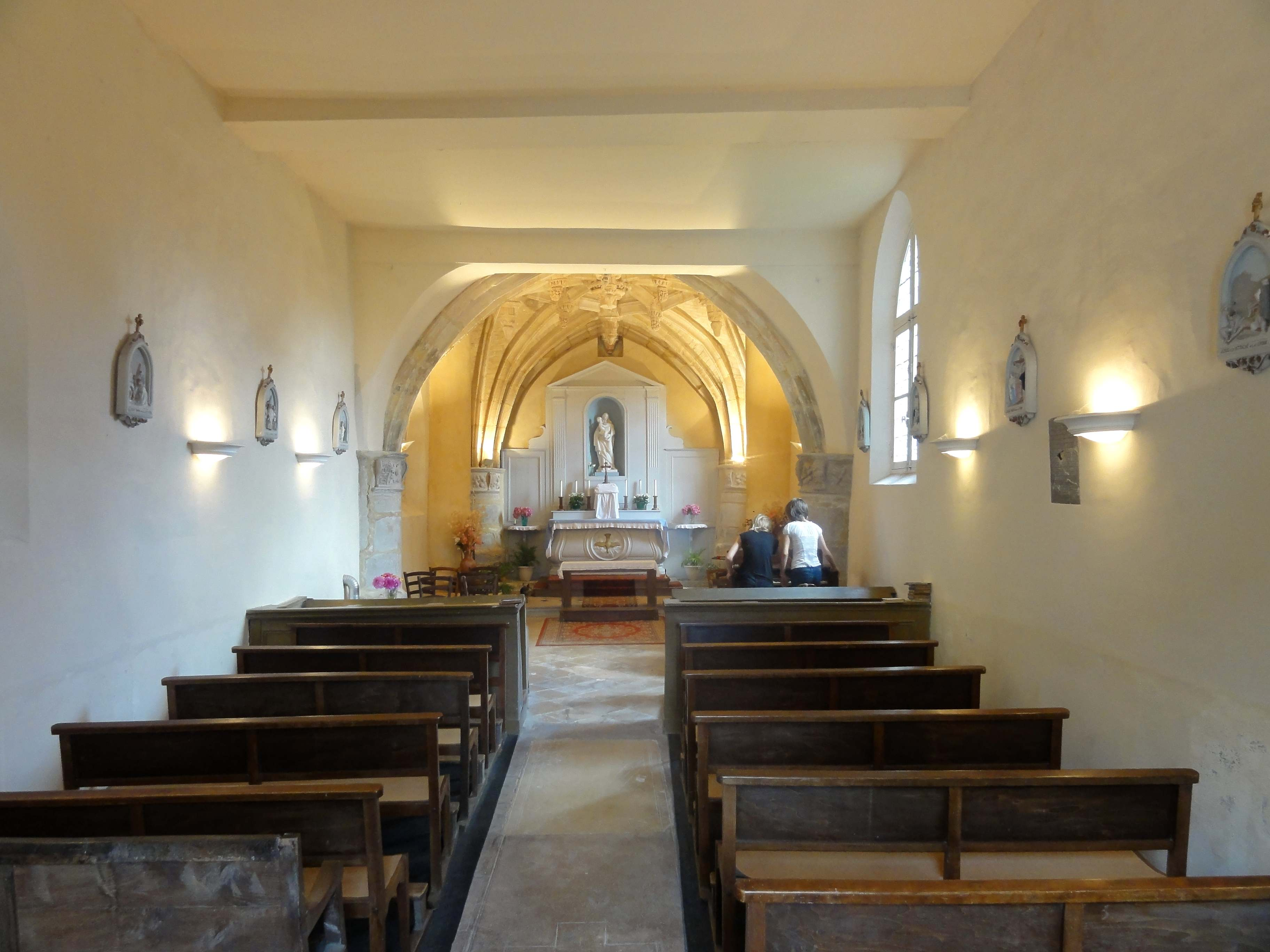 Nef, vue vers l'est.